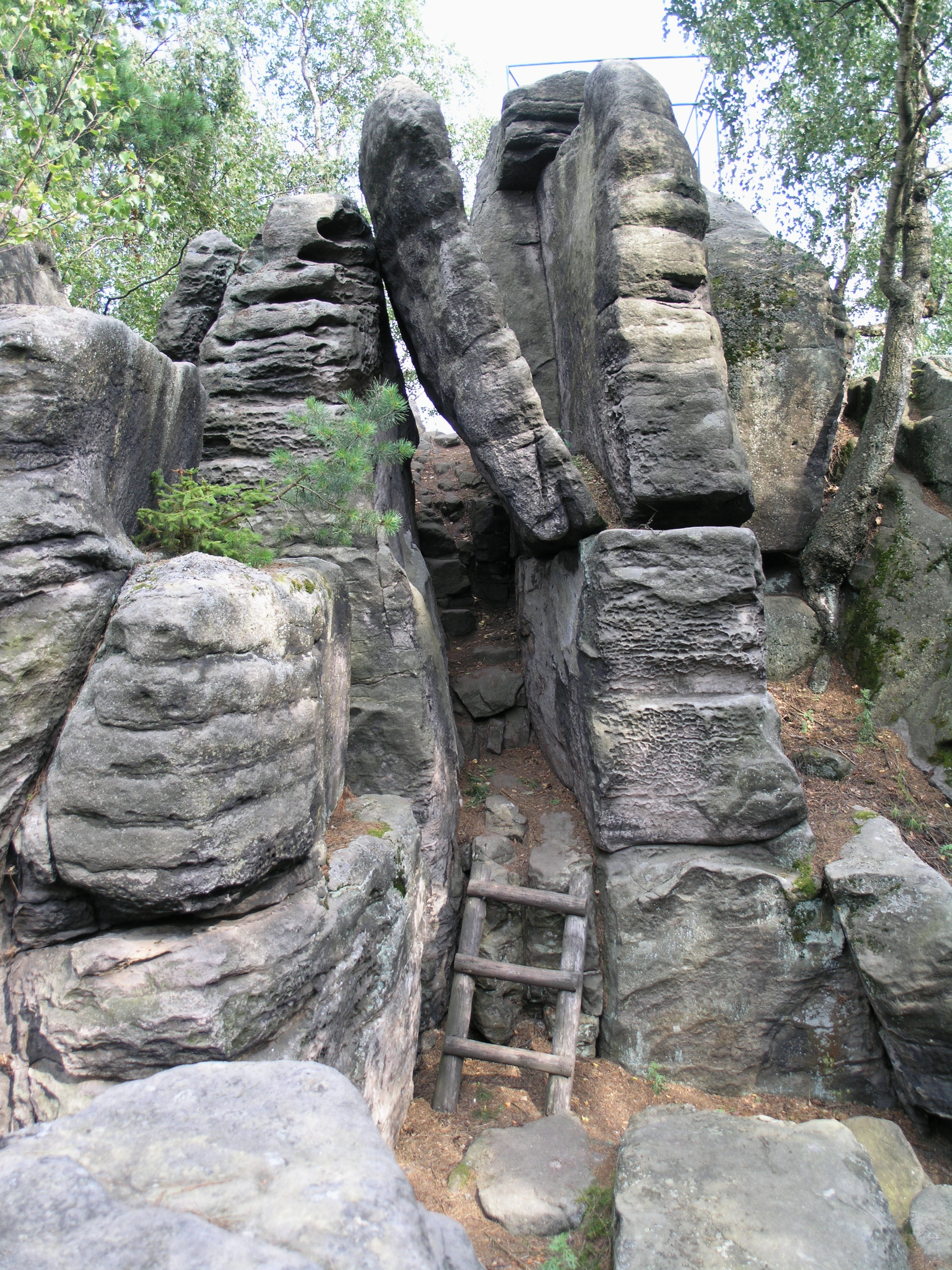 Přivýšina